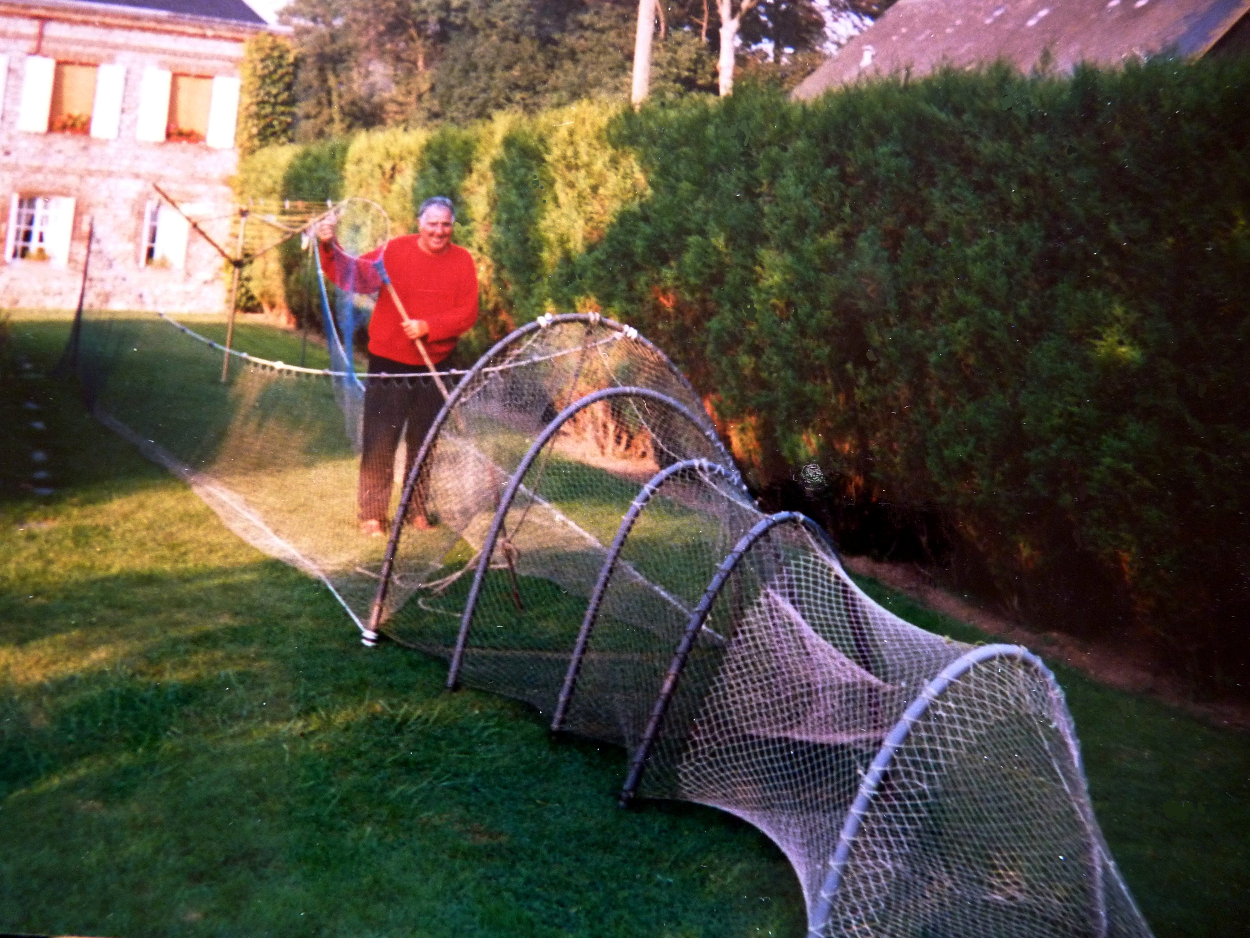 Fabrication d'un verveux fait de manière artisanale par M. Féron dénommé "Gervais"